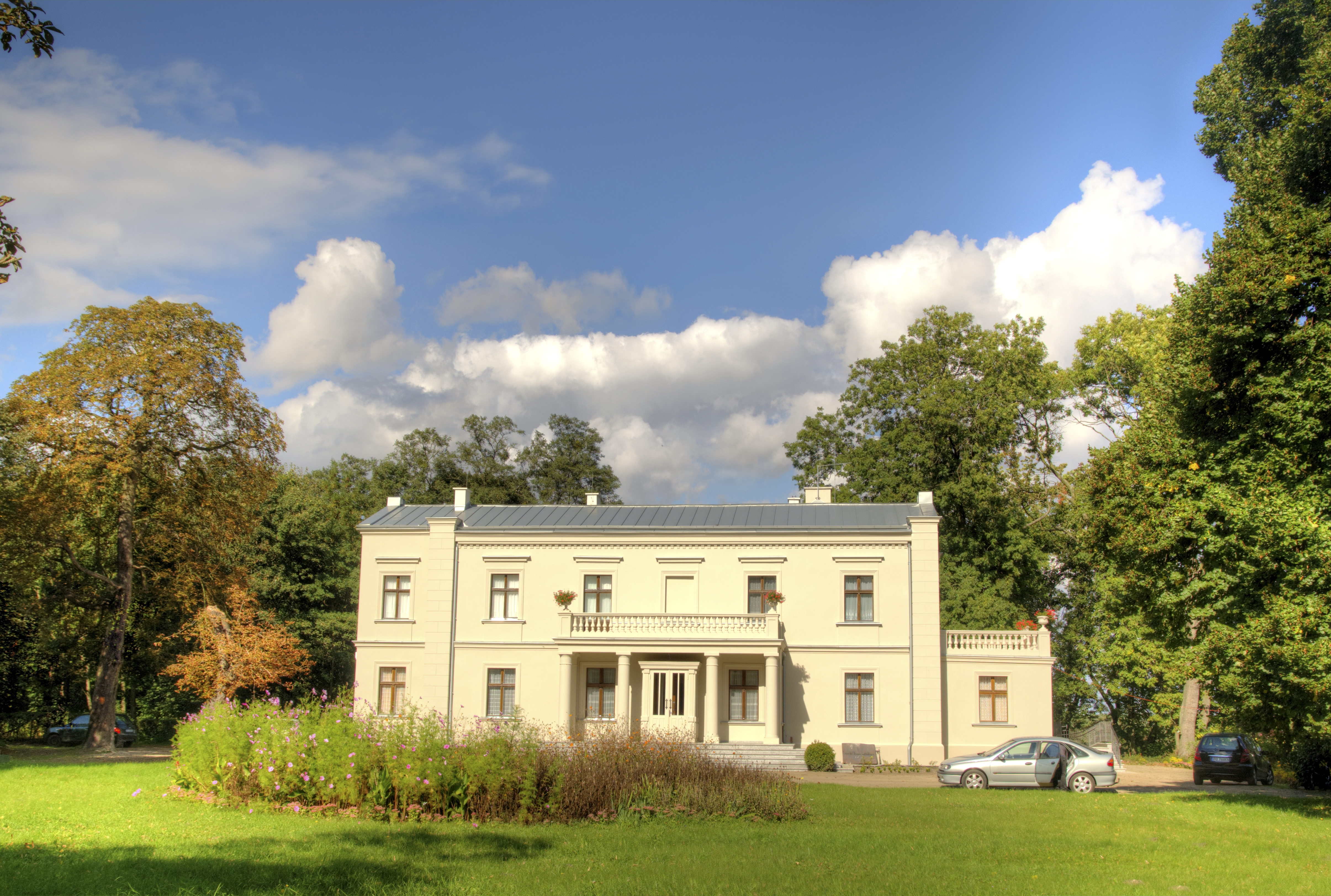 zespół pałacowy z 2. poł. XIX w.: pałac, park Konin, Lwówek